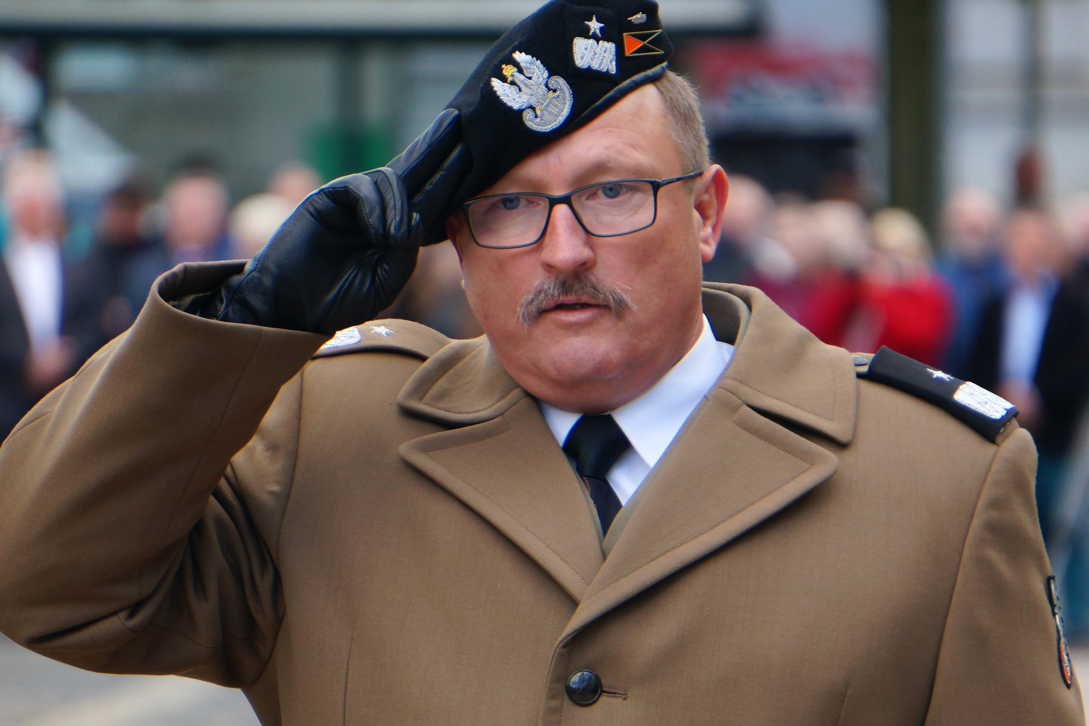 gen. bryg. Dariusz Parylak, zastępca dowódcy - szef sztabu 11 Lubuskiej Dywizji Kawalerii Pancernej w Żaganiu (11 DKPanc)